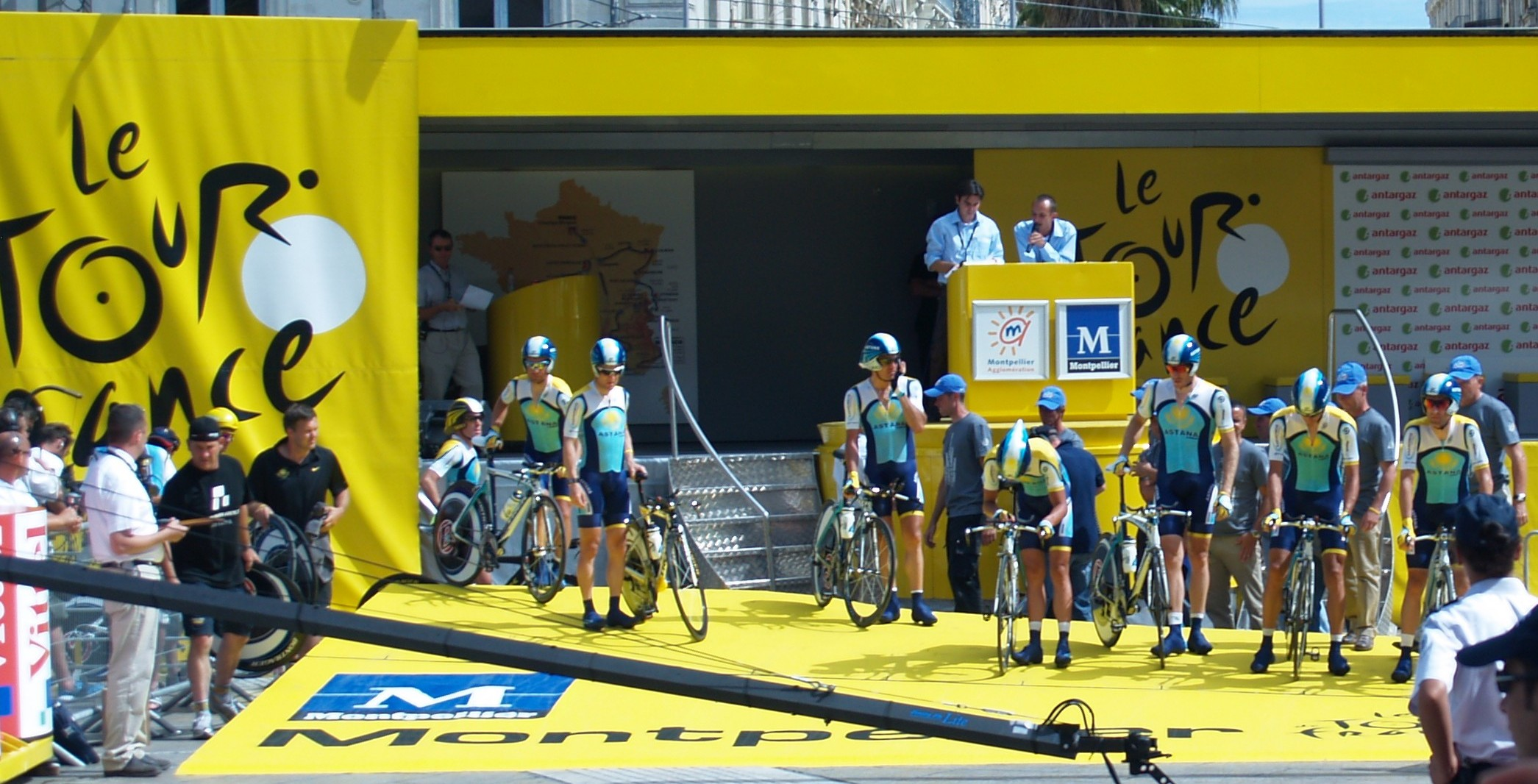 Avant le départ de l'équipe Astana lors de la 4e étape du tour de France 2009